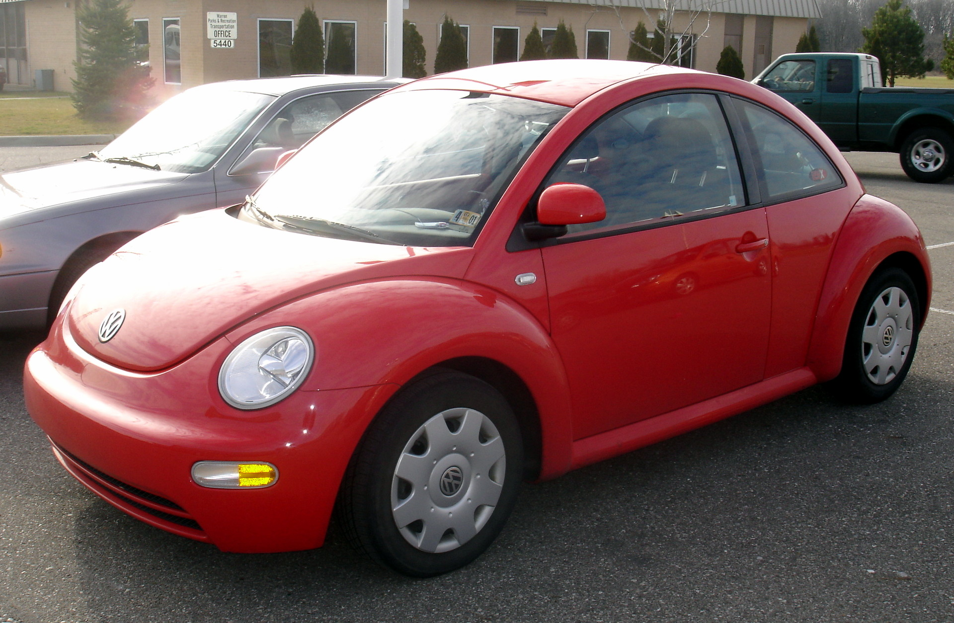 2001 Volkswagen New Beetle